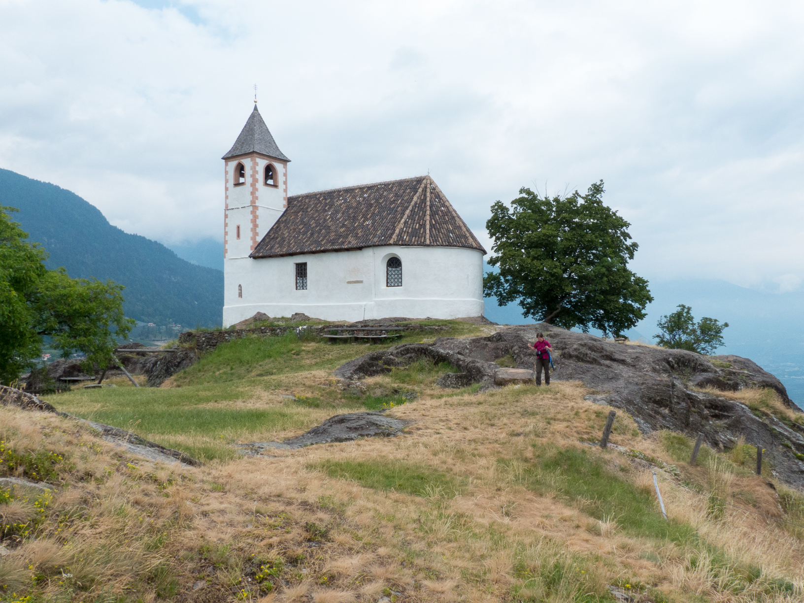 St. Hippolyt bei Naraun, Jakobsweg zwischen Meran und Bozen, Südtirol, Italien